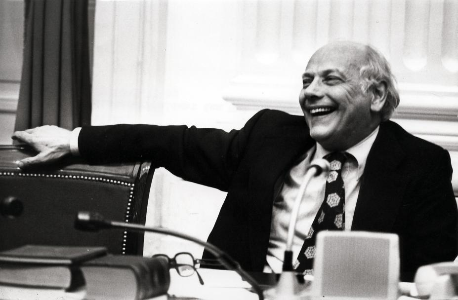 Een lachende Minister-President Joop den Uyl. Den Haag, Nederland, 10 maart 1977.